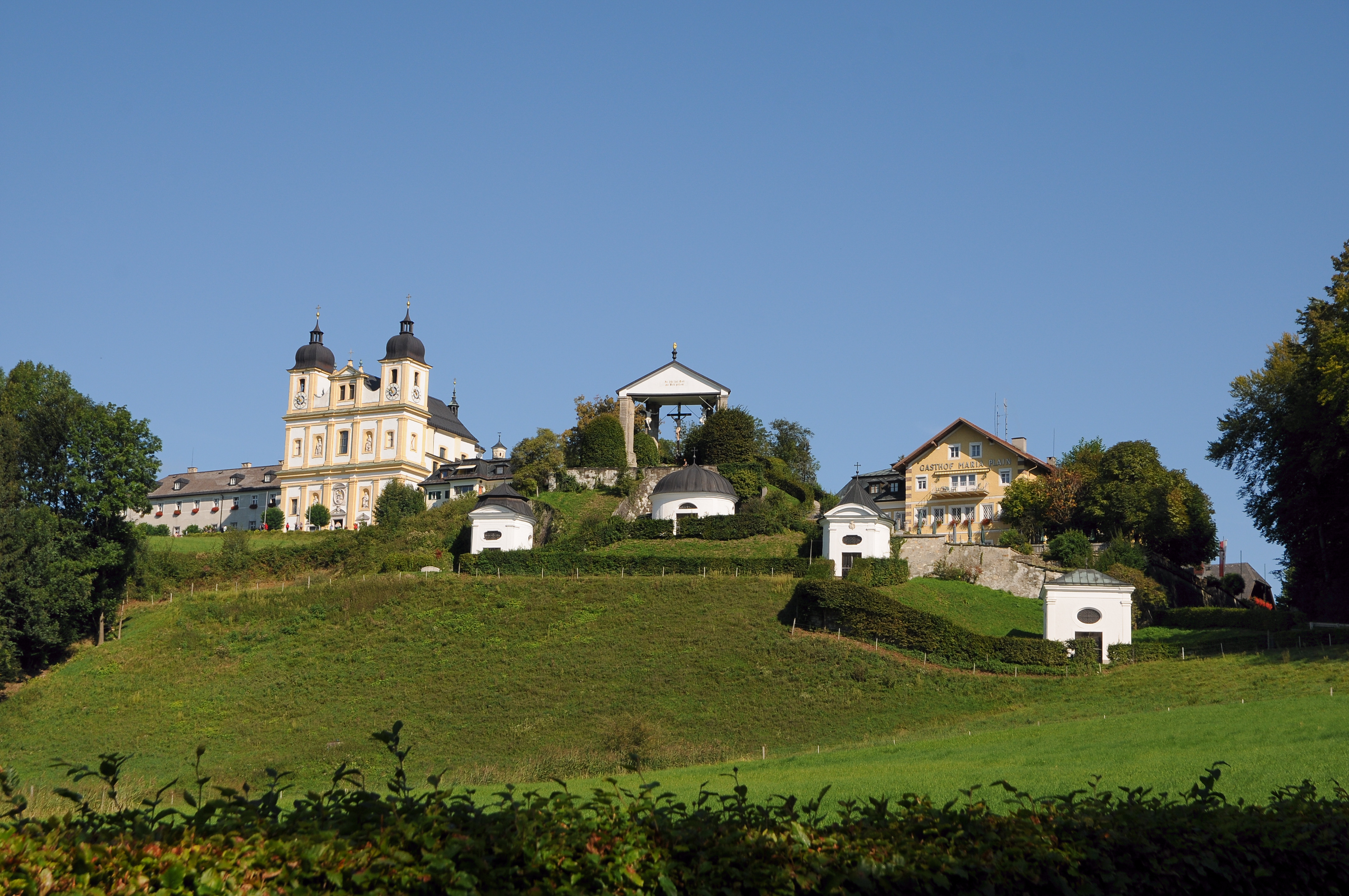 Maria Plain ist ein römisch-katholischer Wallfahrtsort in der Gemeinde Bergheim im Norden des österreichischen Bundeslandes Salzburg. Die Wallfahrtsbasilika Mariæ Himmelfahrt (15. August) auf dem Plainberg nördlich von Salzburg bildet mit den sie umgebenden Kapellen und Gebäuden ein geschlossenes barockes Ensemble. In der Wallfahrtskirche wird das Gnadenbild Maria Plain „Maria Trost“ verehrt.